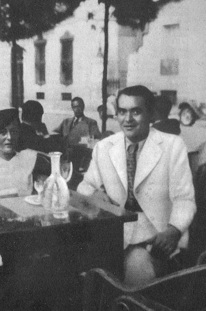 Última foto conocida de Federico García Lorca, con Manuela Arniches en la terraza del Café Chiki-Kutz Paseo de Recoletos 29, Madrid, julio de 1936